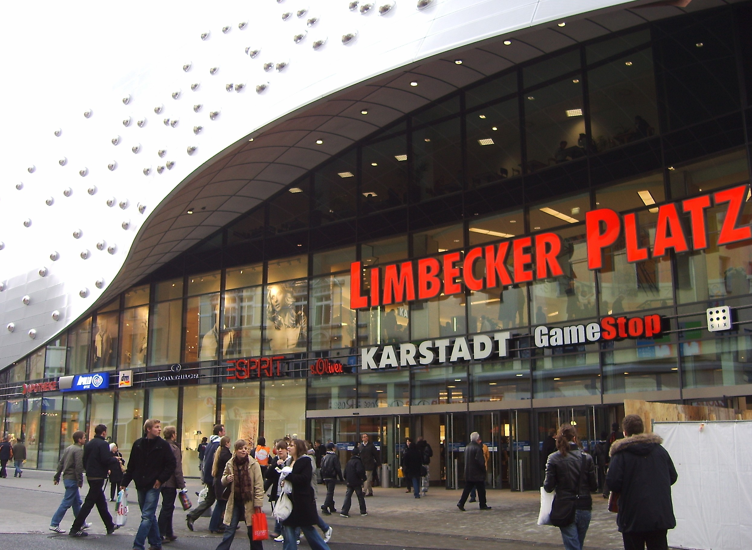 Karstadt Essen, Limbecker Platz neu, Haupteingang, 1 Woche nach Eröffnung